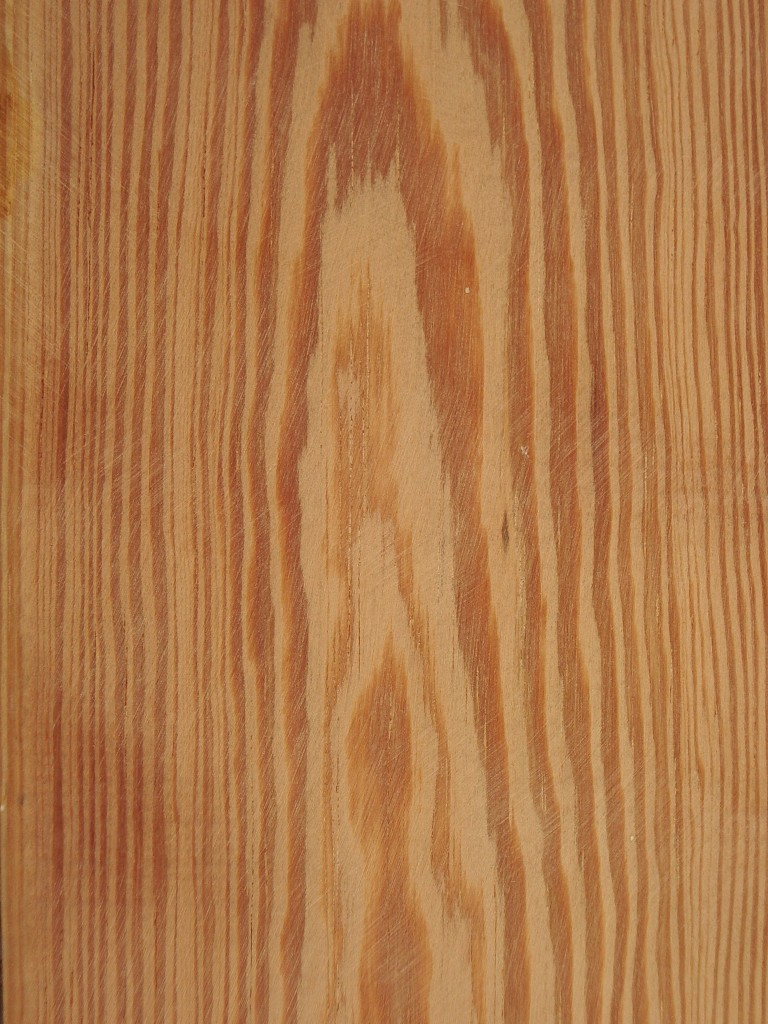 Pitch Pine Honduras, Alte Fußbodendiele abgeschliffen, unbehandelt